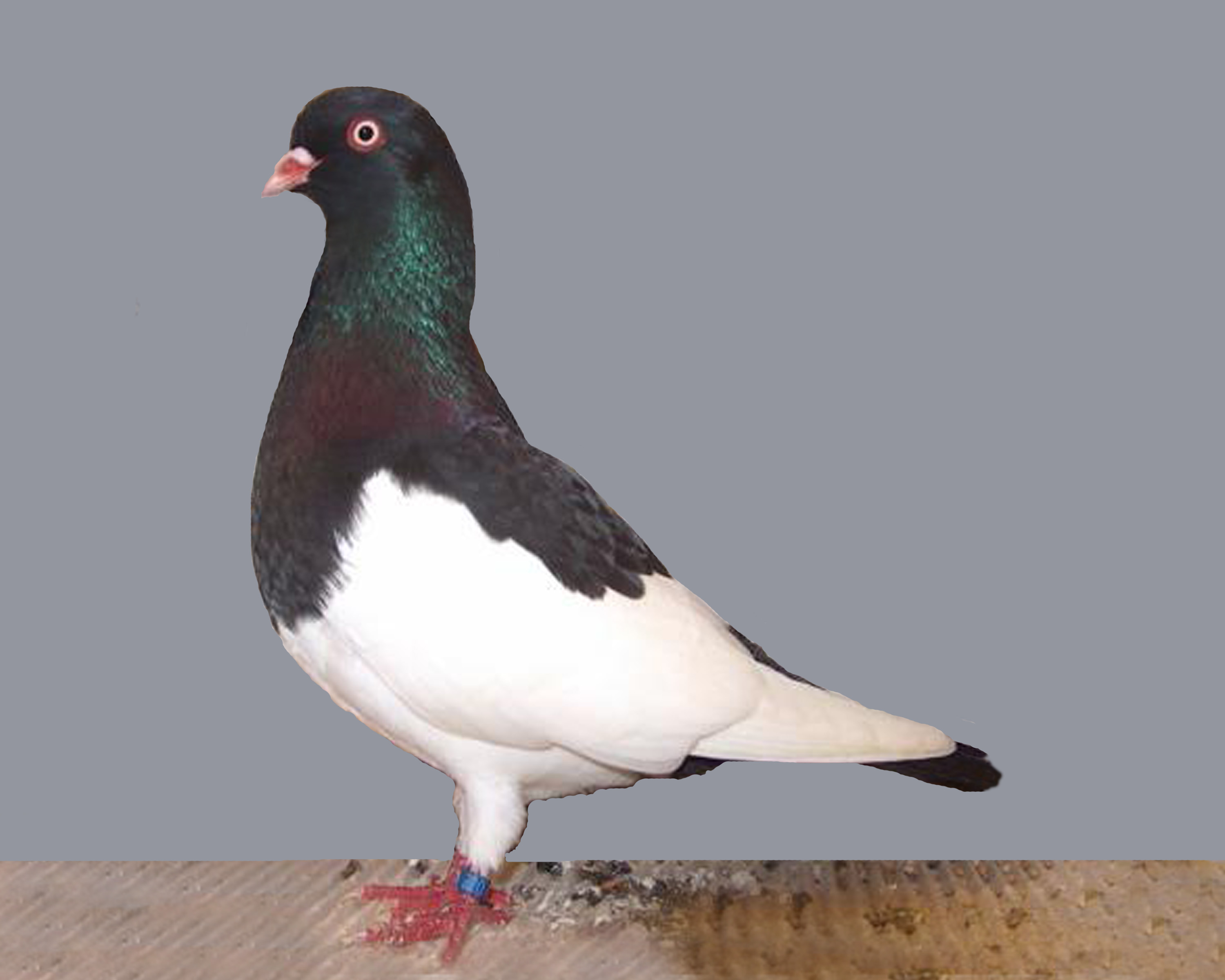 Old German Magpie Tumbler (Blue Checquer)